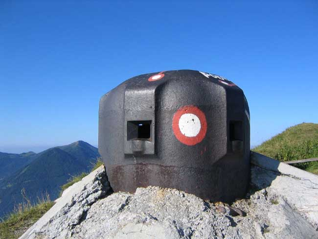 Alpenwall: Bunker num. 1 auf dem kote Lajnar. Ondřej Filip 2004 - selbst gemacht